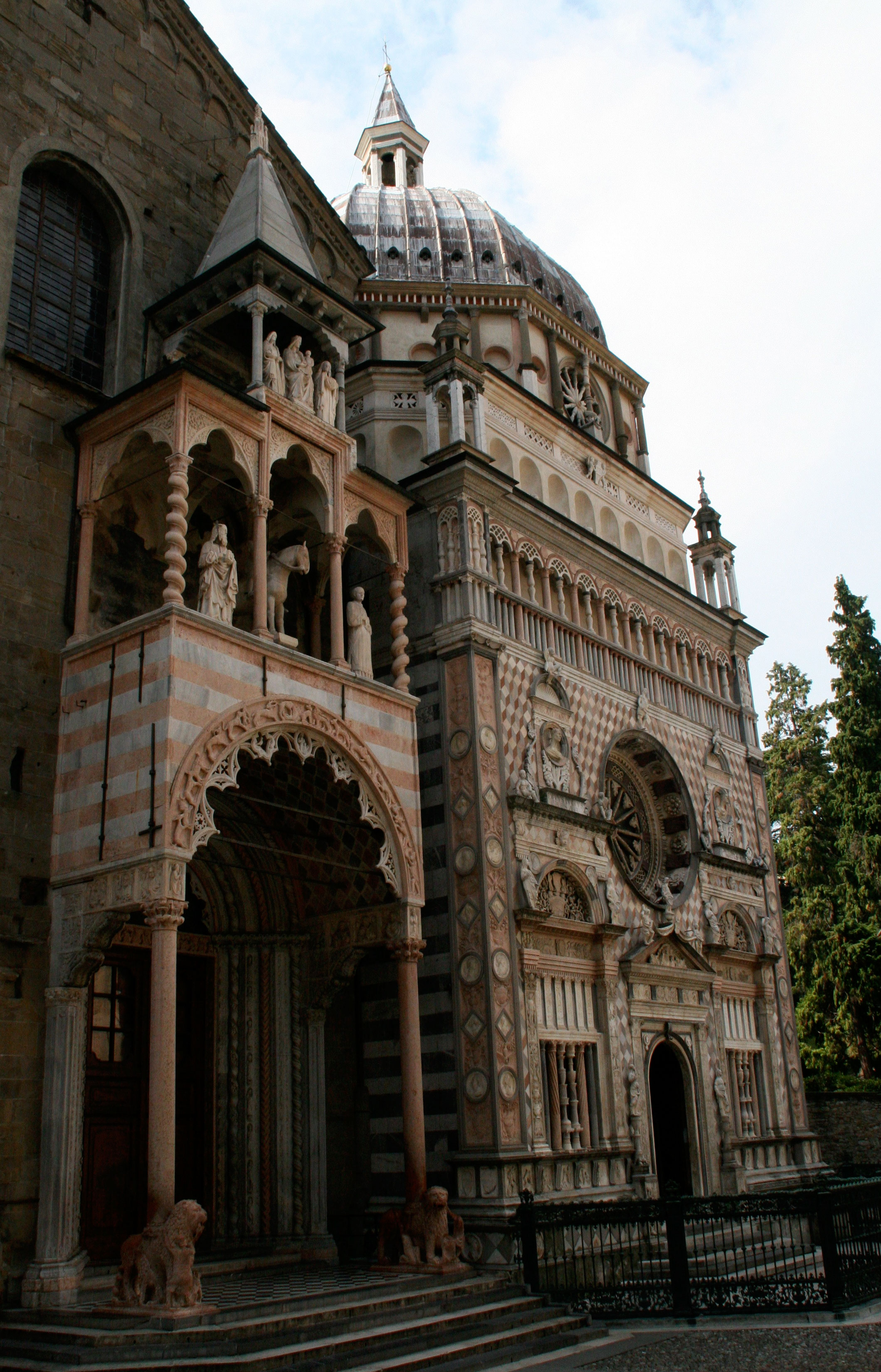 Bergamo Alta Basílica de Santa Maria Maggiore, que comenzó a construirse en 1137 y se caracteriza por su pórtico de mármol rojo y blanco y su interior barroco. La entrada septentrional se llama también entrada de los leones rojos, por el pórtico sostenido por columnas en forma de leones de mármol rojo. La entrada meridional (entrada de los leones blancos), por su parte, se caracteriza por sus columnas sostenidas por leones de mármol blanco. En el exterior, la Basílica ha mantenido su carácter románico primitivo y la combinación de mármoles rojos, blancos y negros, mientras que en el interior se confunden el estilo barroco y el renacentista, en sus ricos ornamentos y sus notables frescos flamencos. El célebre compositor bergamasco Donizetti está aquí sepultado.